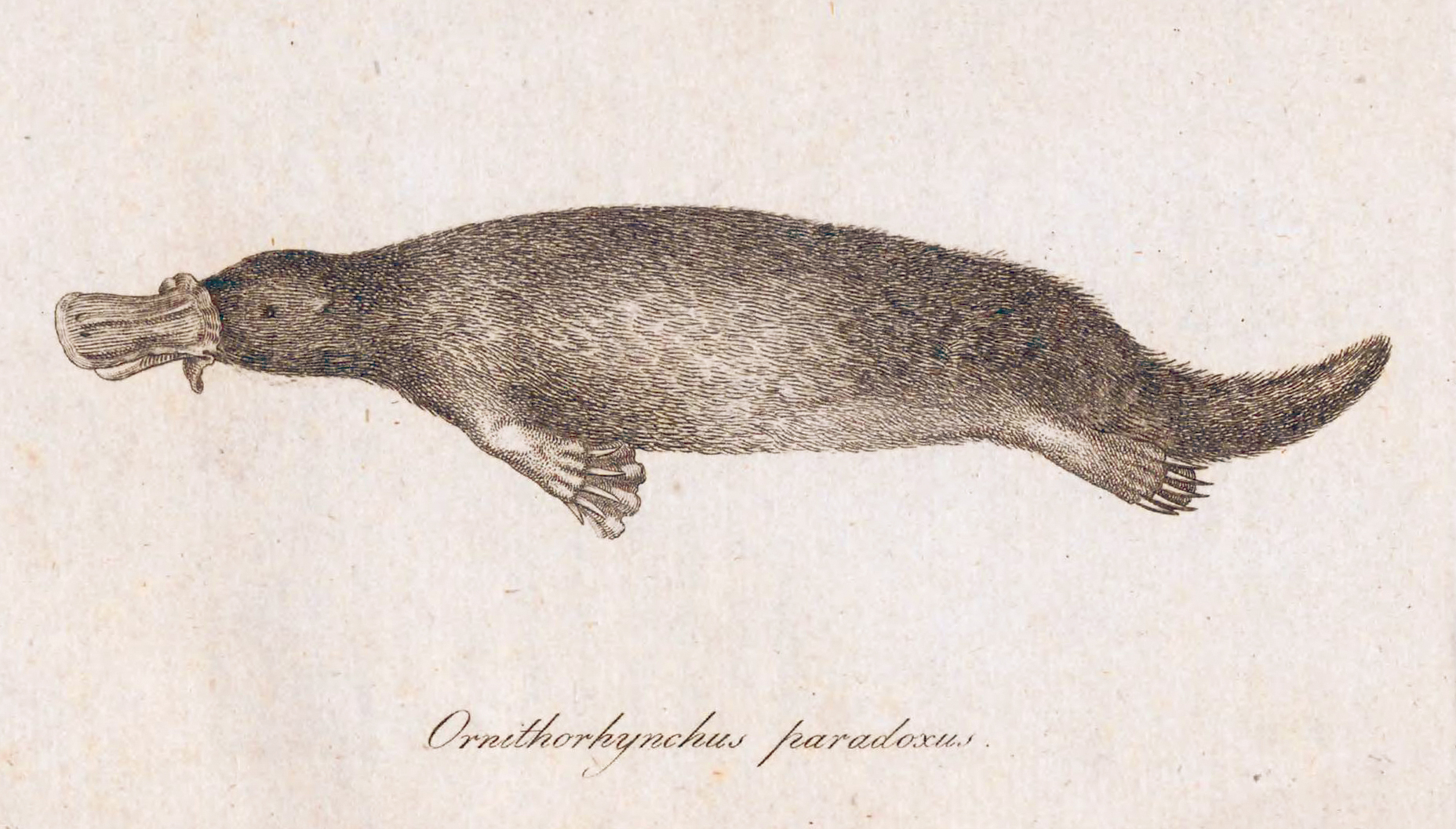 Illustration from Abbildungen naturhistorischer Gegenstände.